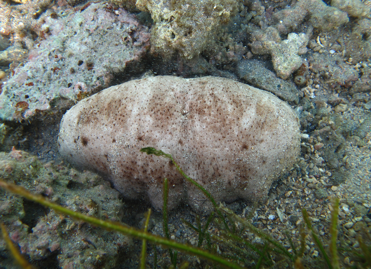 Une holothurie blanche à mamelles (peut-être Holothuria fuscogilva ?) à la Réunion.